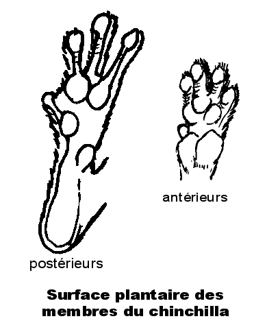 Surface plantaire du chinchilla. Membres inférieurs et supérieurs, comparaison.( Compared Chichilla's paws.)